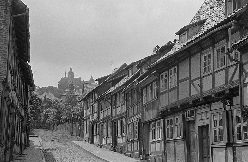 Original image description from the Deutsche Fotothek Blick aus der Altstadt zum Schloss